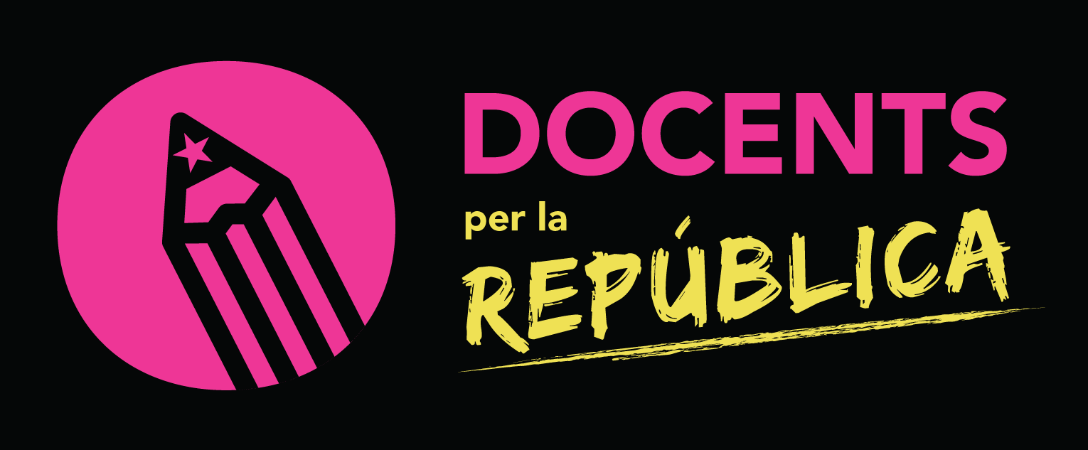 Logotip Docents per la República